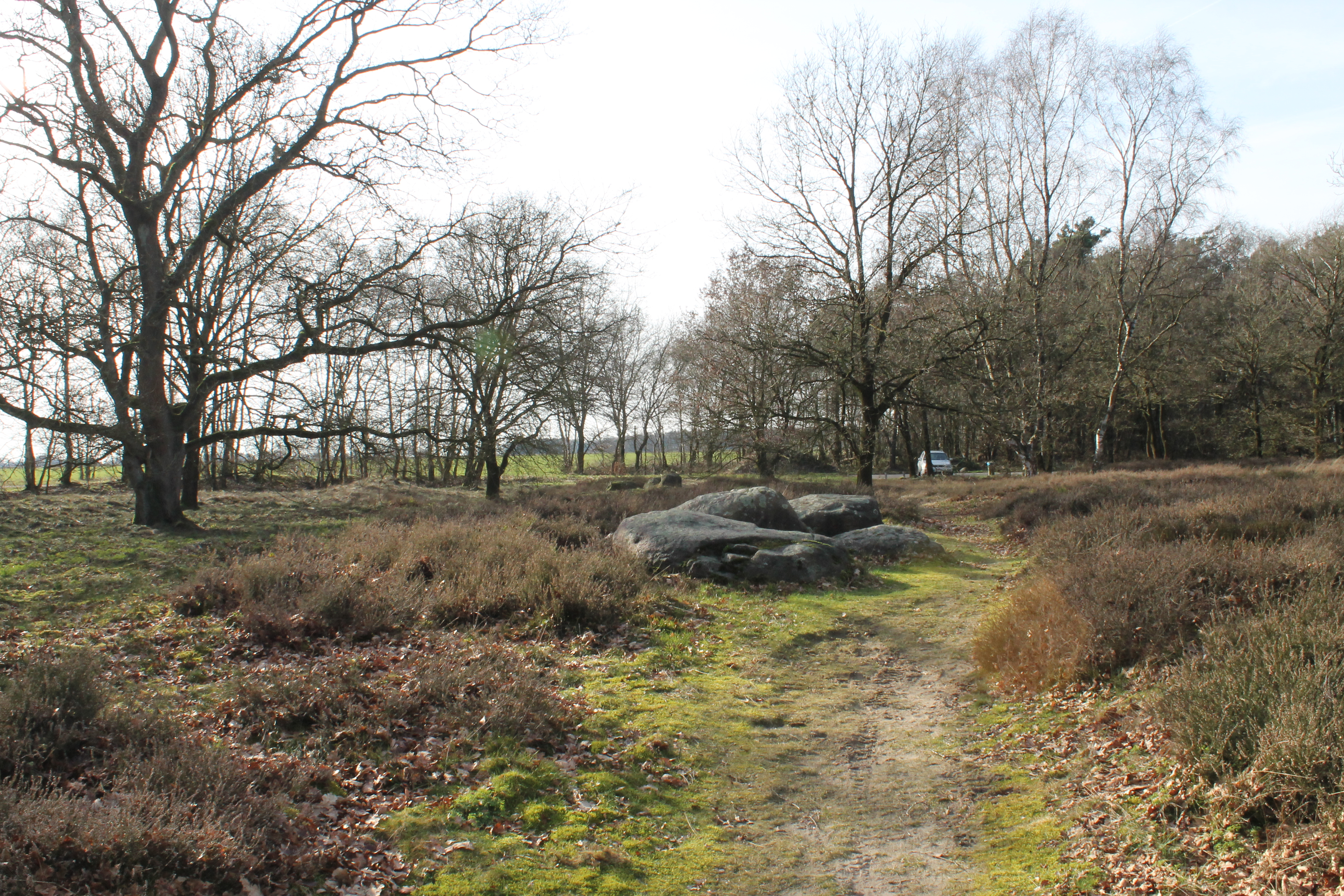 Großsteingrab Groß Berßen IV